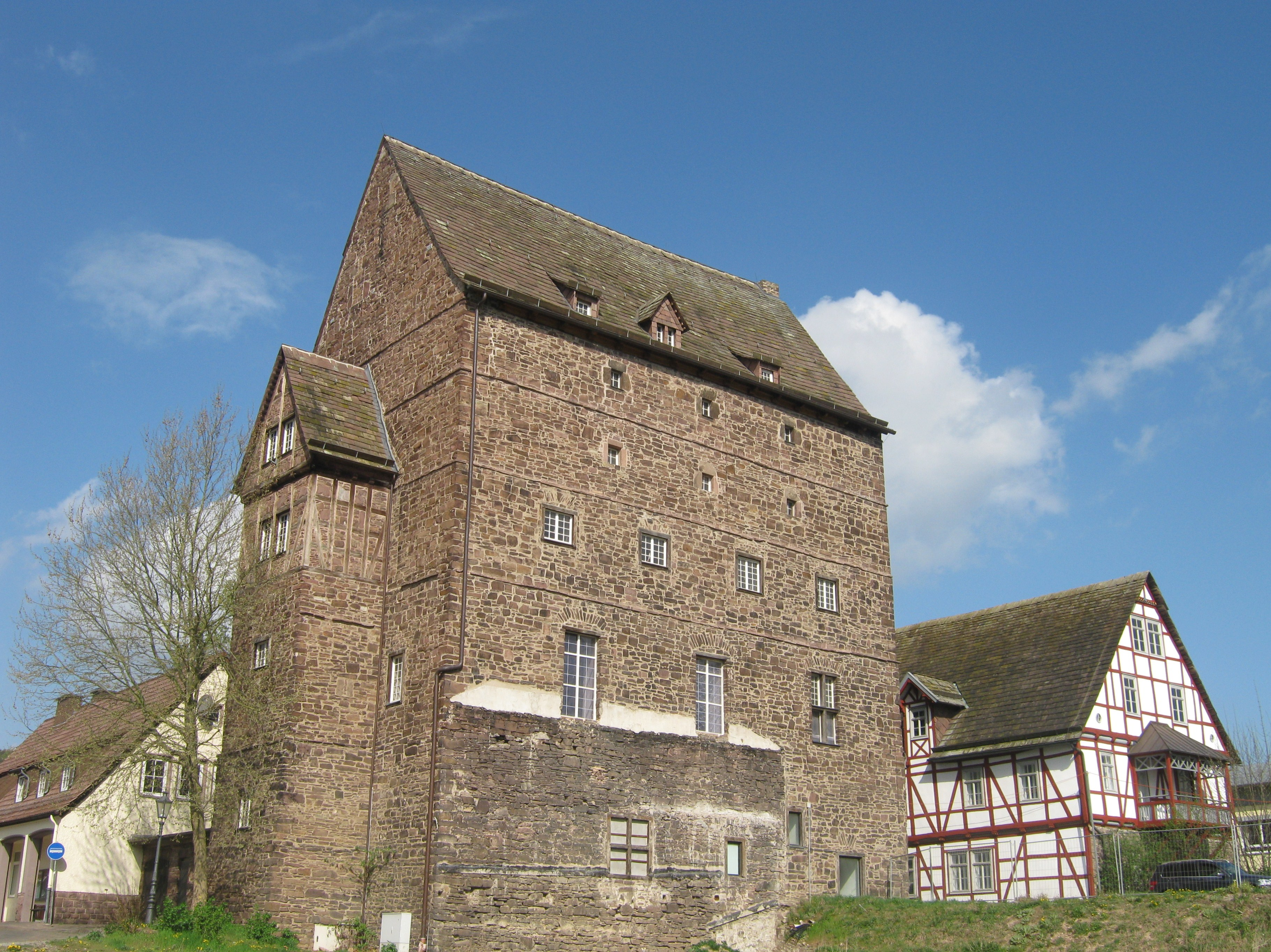 Burg Beverungen von der Weserseite